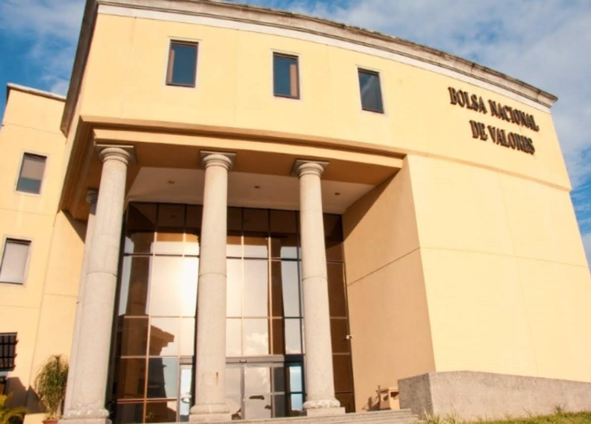 Sede de la Bolsa Nacional de Valores de Costa Rica, en Santa Ana, provincia de San José.